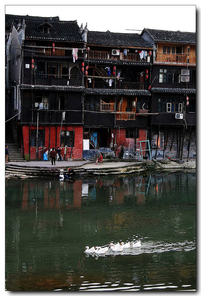 Fenghuang, Hunan, China. Use Canon 400D.